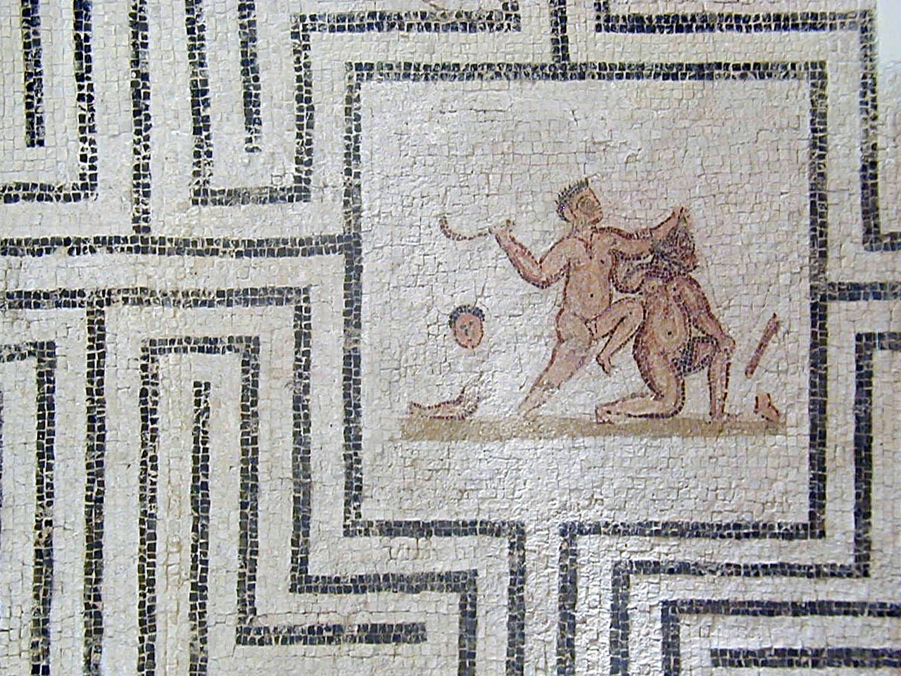 Thésée décapitant le Minotaure, mosaïque de Thuburbo Majus, Musée du Bardo (Tunis)